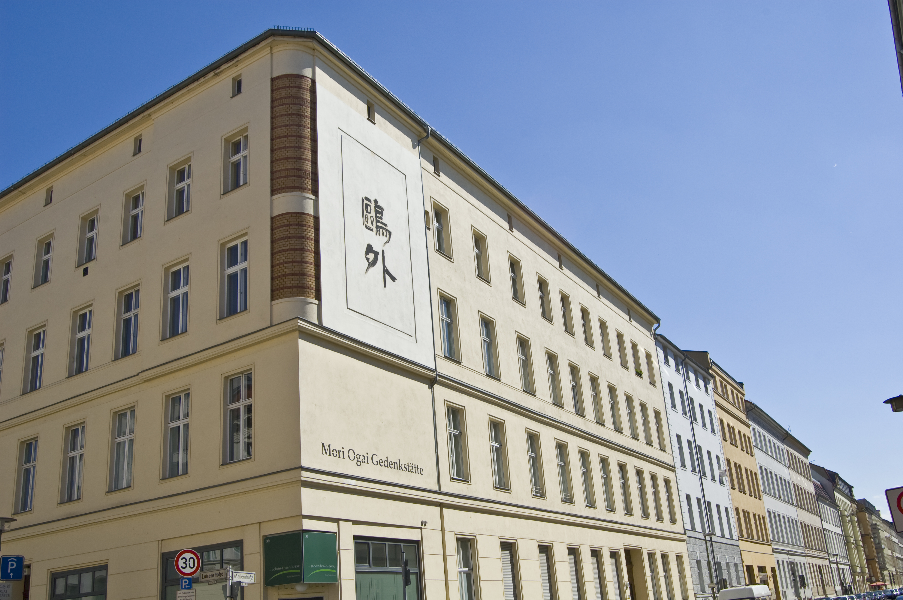 Mori-Ogai-Gedenkstätte in Berlin